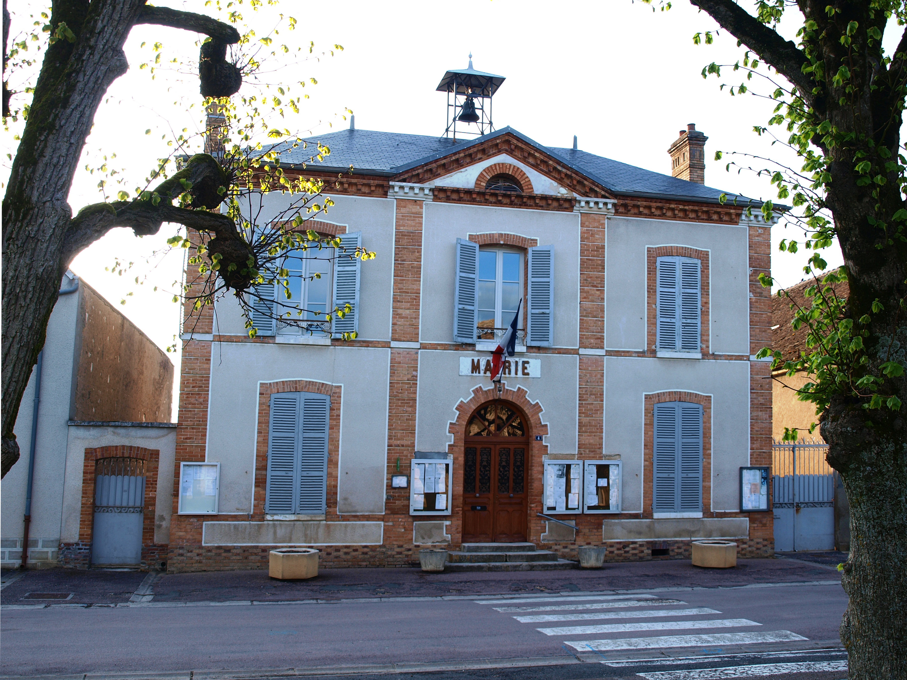 Serbonnes (Yonne, France) ; la mairie